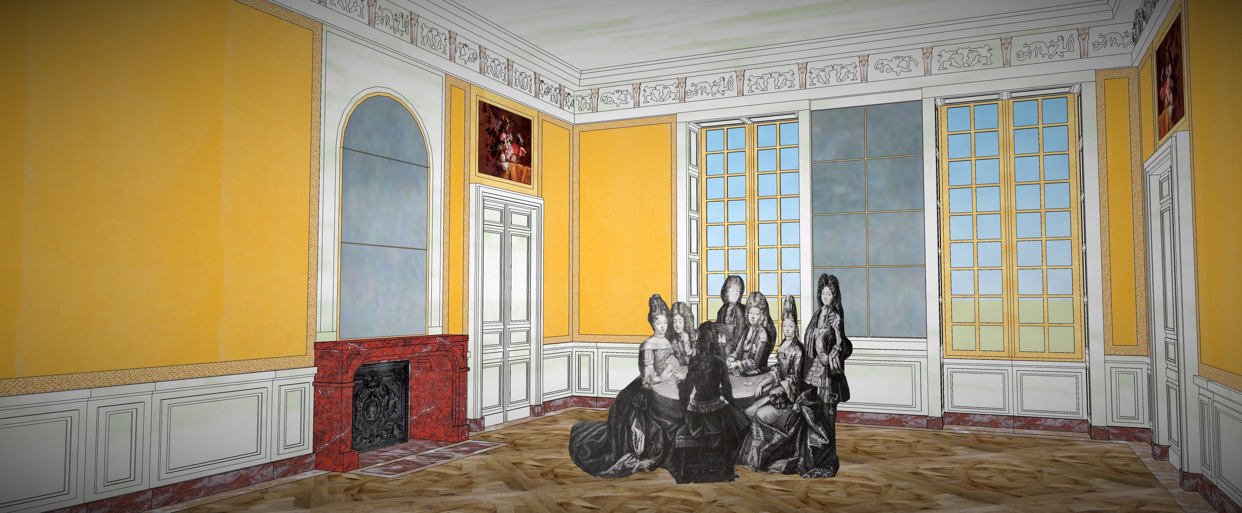 Essai de restitution de la chambre dite des jeux, vers 1700. De nombreuses tables de jeu prenaient place dans cette pièce, pour les soirées dites d'appartement.